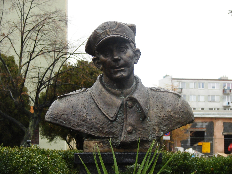 Popiersie Hieronima Dekutowskiego w Tarnobrzegu